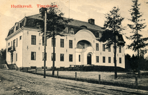 Byggnaden uppfördes ursprungligen 1909 för Bergsjö och Forsa tingslag, Norra Hälsinglands domsaga. Arkitekter Hagström & Eknam